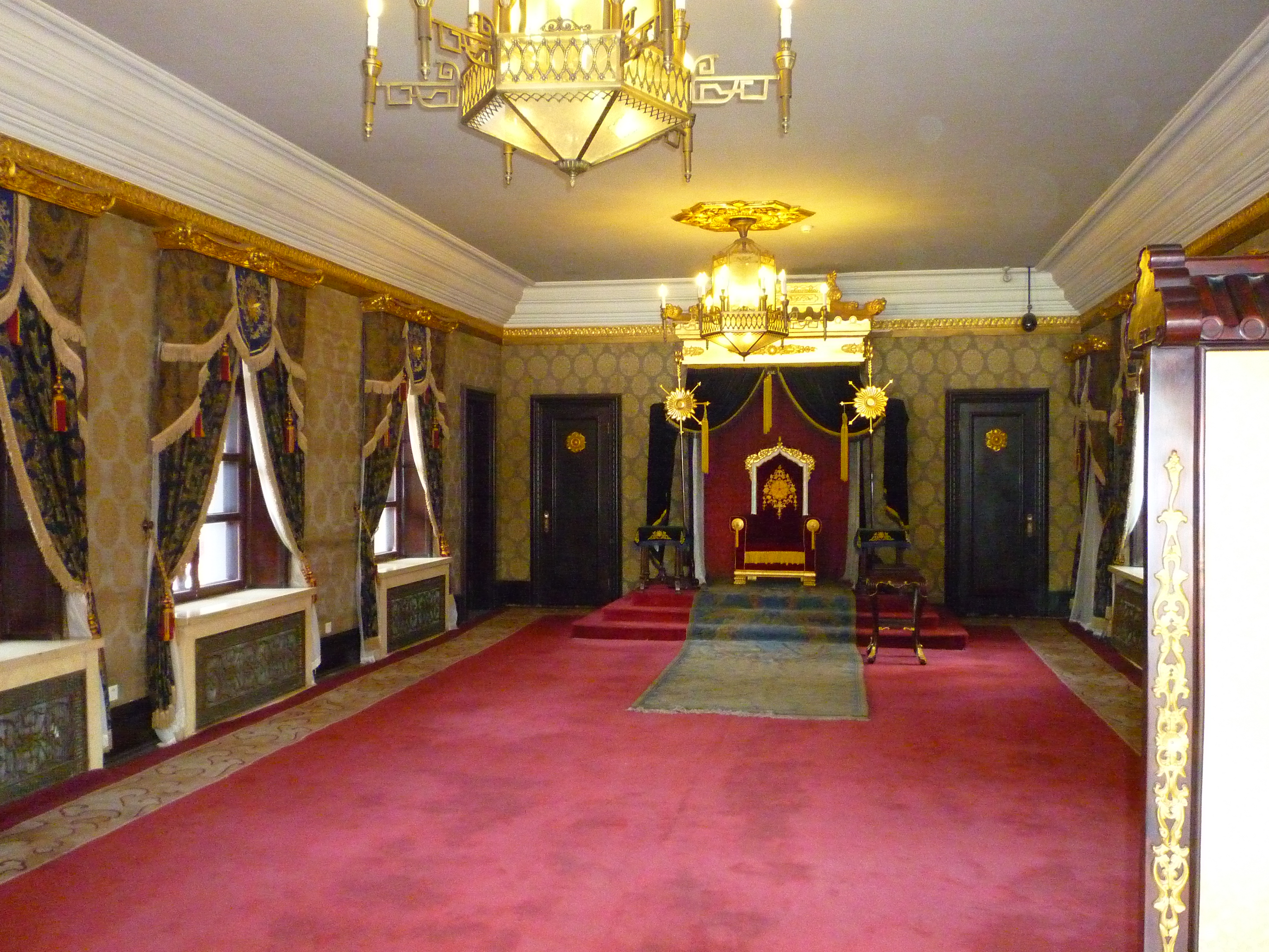 Thronsaal des madschurischen Kaisers Puyi im Palast in Changchun